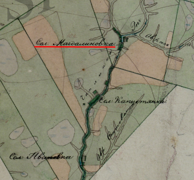 Частина карти 1794 року на якій зображується нещодавно сторена Магдалинівка